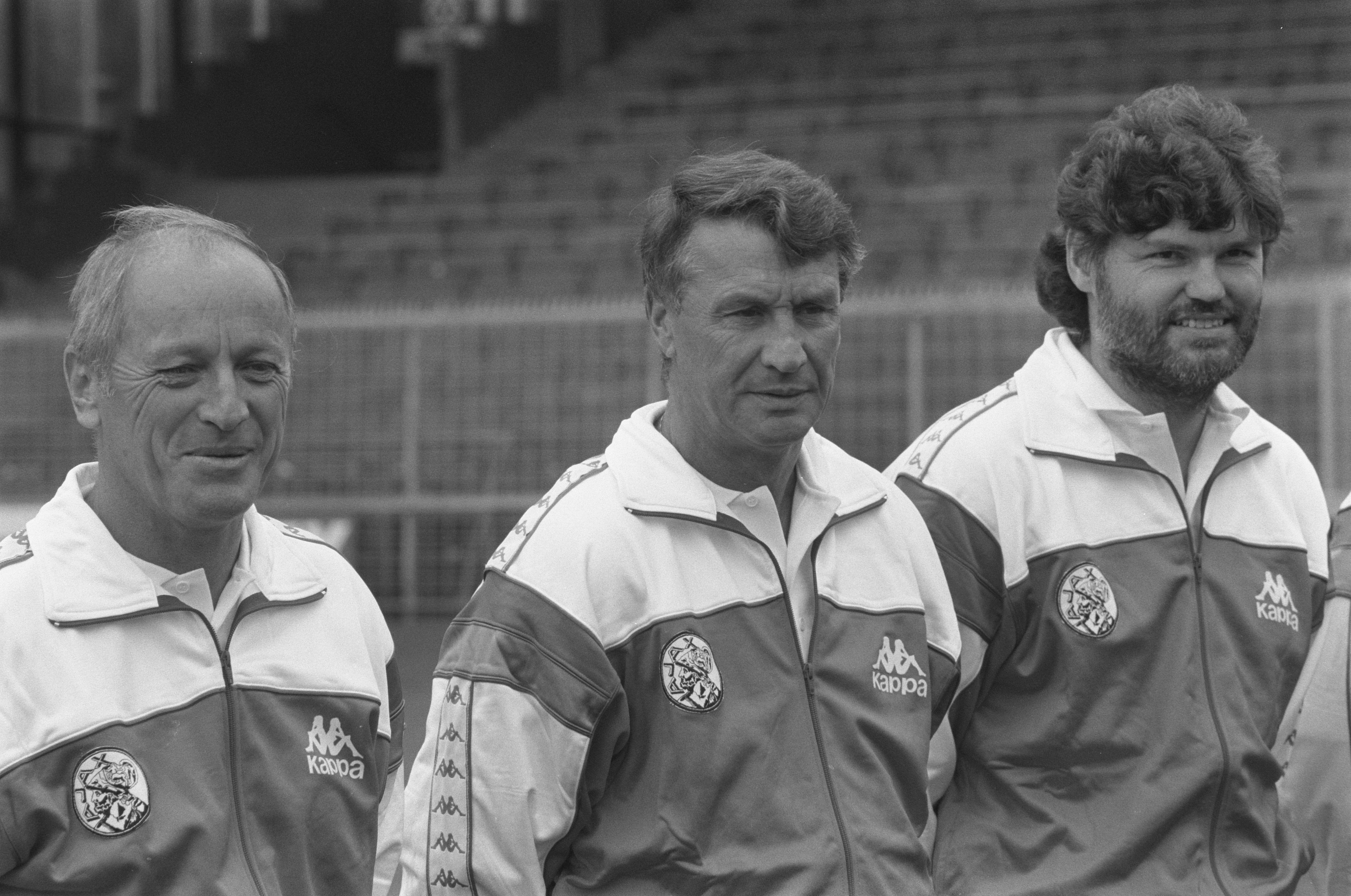 Collectie / Archief : Fotocollectie Anefo Reportage / Serie : [ onbekend ] Beschrijving : Persdag Ajax; trainer Kurt Linder (nrs. 21, 22), kop, nr. 23: trainerstrio v.l.n.r. Kurt Linder , Spitz Kohn en Barry Hulshoff Datum : 18 juli 1988 Trefwoorden : sport, voetbal Persoonsnaam : Barry Hulshoff, Kohn, Spitz, Linder, Kurt Instellingsnaam : NRS Fotograaf : Bogaerts, Rob / Anefo Auteursrechthebbende : Nationaal Archief Materiaalsoort : Negatief (zwart/wit) Nummer archiefinventaris : bekijk toegang 2.24.01.05 Bestanddeelnummer : 934-2881